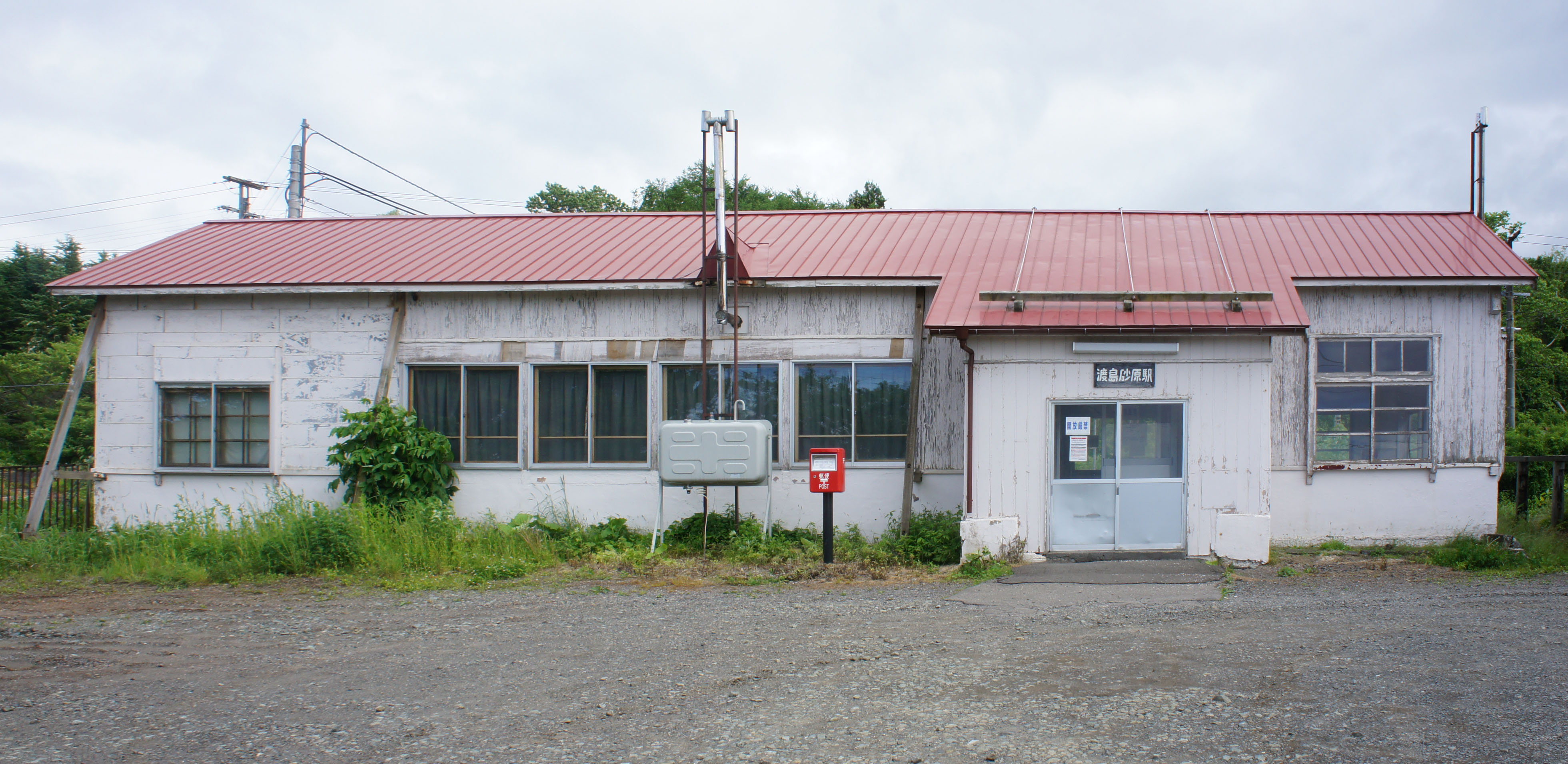 JR函館本線・渡島砂原駅の駅舎